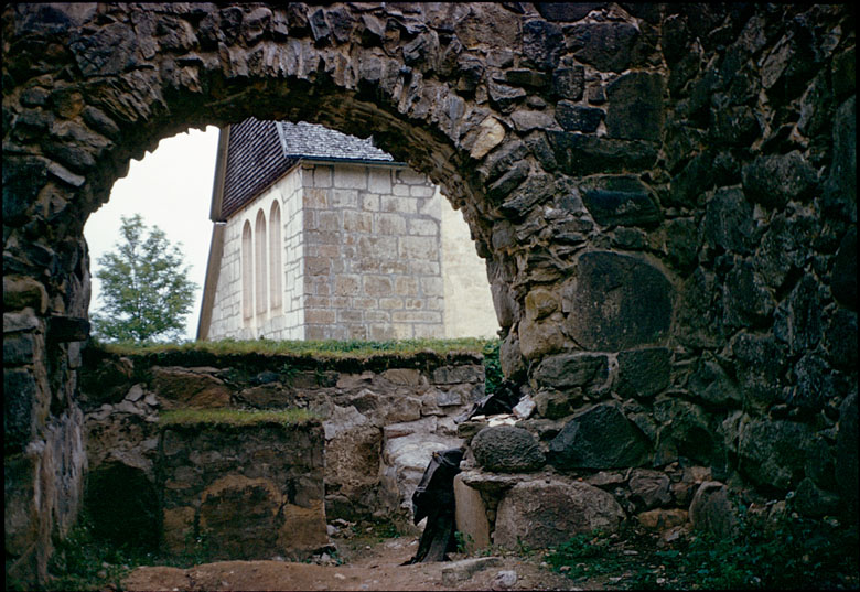 Nydala kloster Motiv: Nydala kloster Nyckelord: Riksintressen Kategori: Kloster, Kyrkomiljö Nydala kloster.